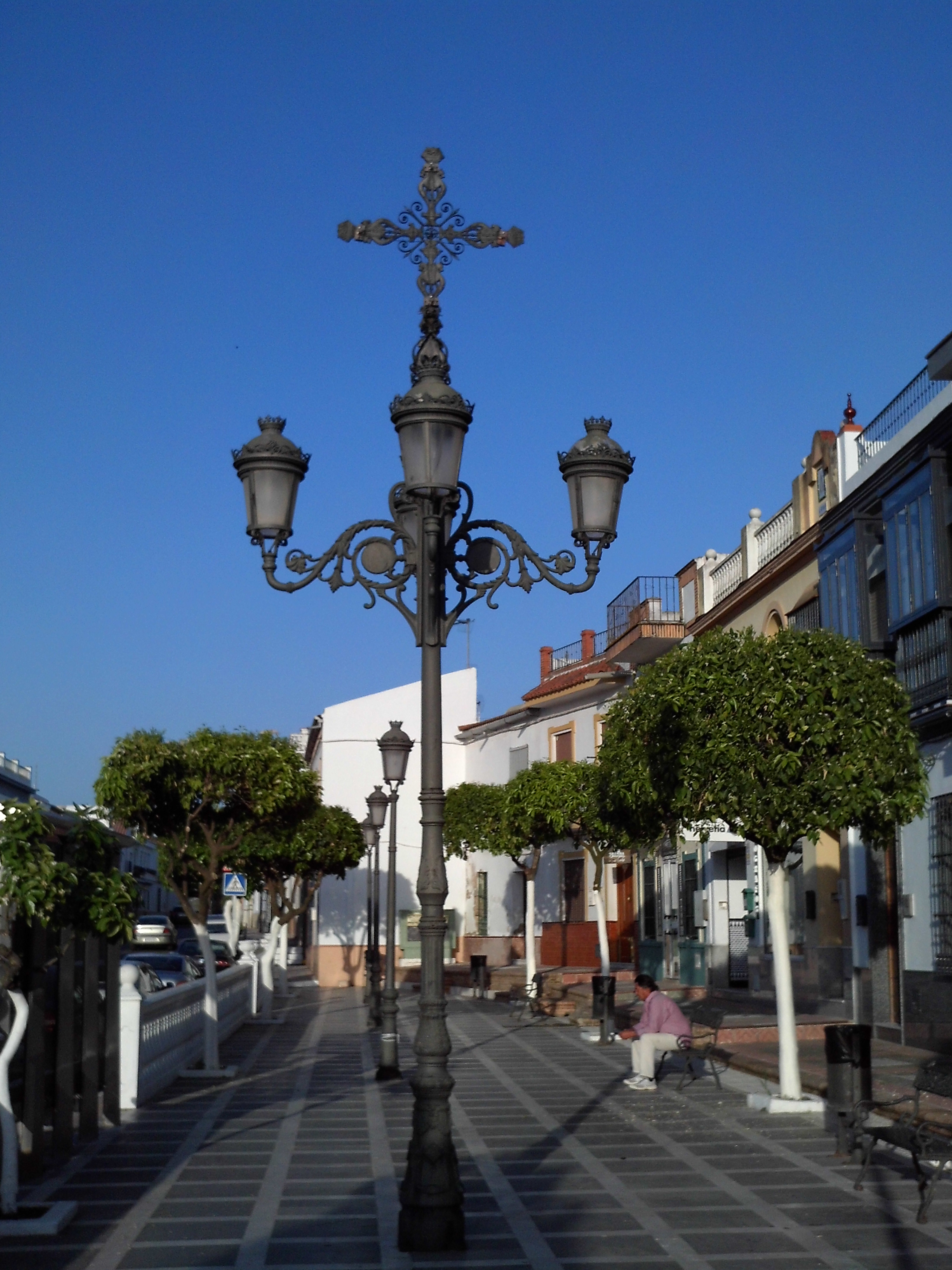 Farola fernandina de cuatro brazos con Cruz encima en la Plaza de la Cruz, en la localidad de Espartinas